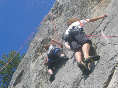 Club escalade de l'ENSIACET